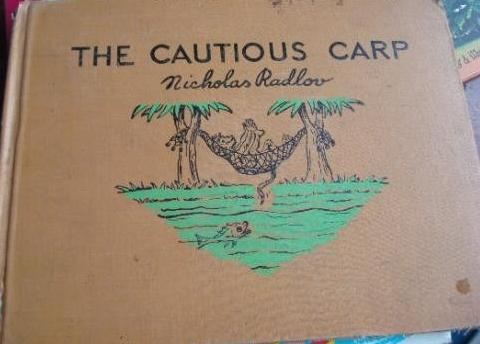 Обложка издания: Nicholas Radlov. The cautious carp and other fables in pictures. / Translated by Helen Black. New York: Coward McCann, 1938.